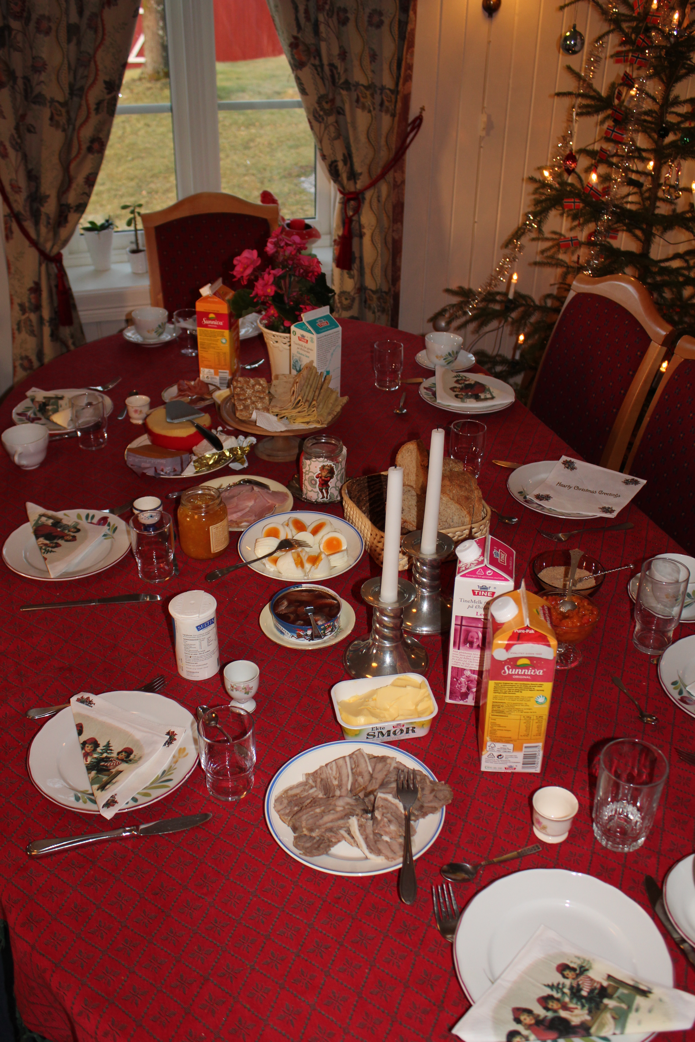 Julefrokost.